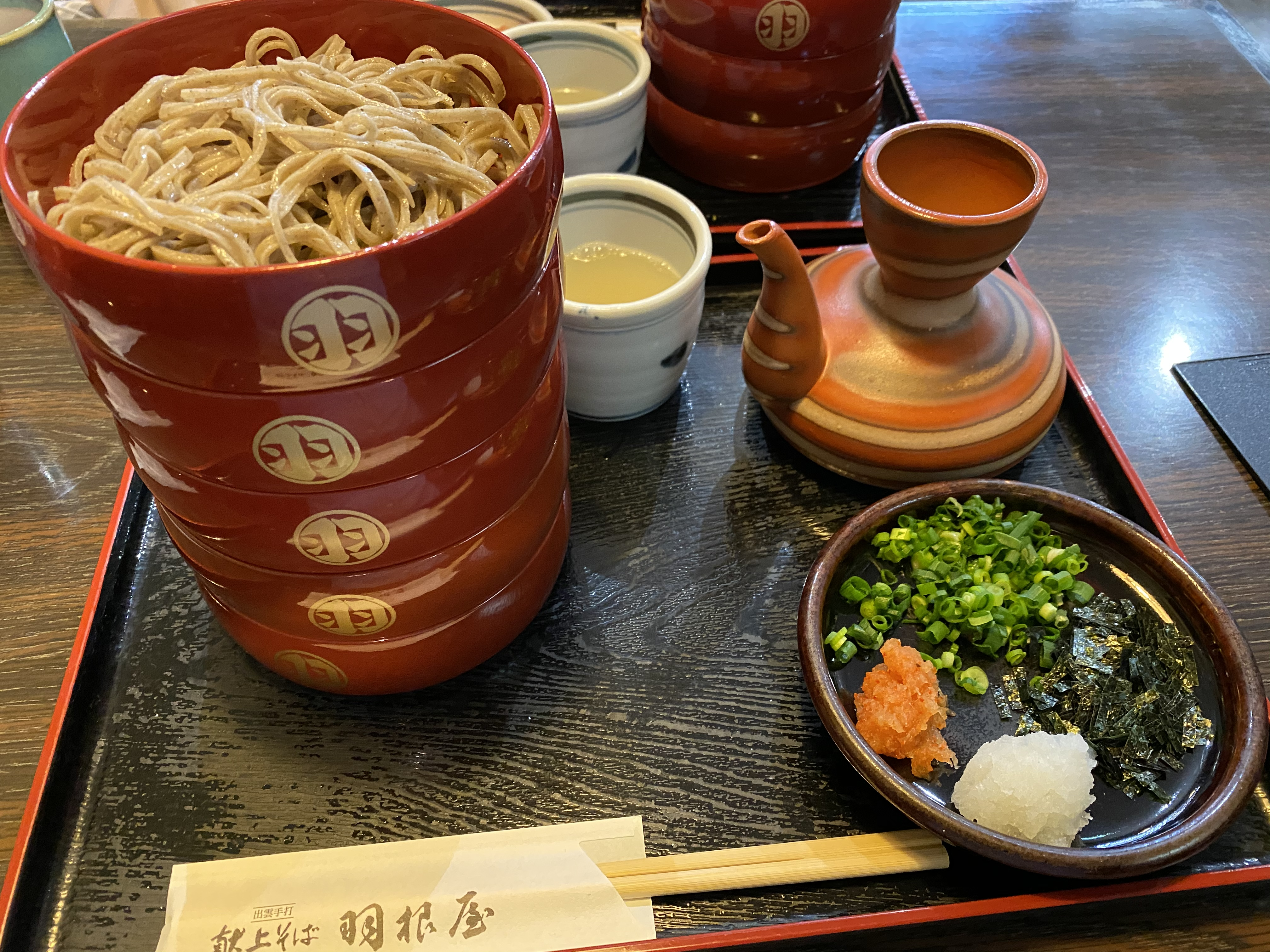 出雲蕎麦(割子そば5段)と標準的な薬味である、青ネギ、海苔、もみじおろし、大根おろし。